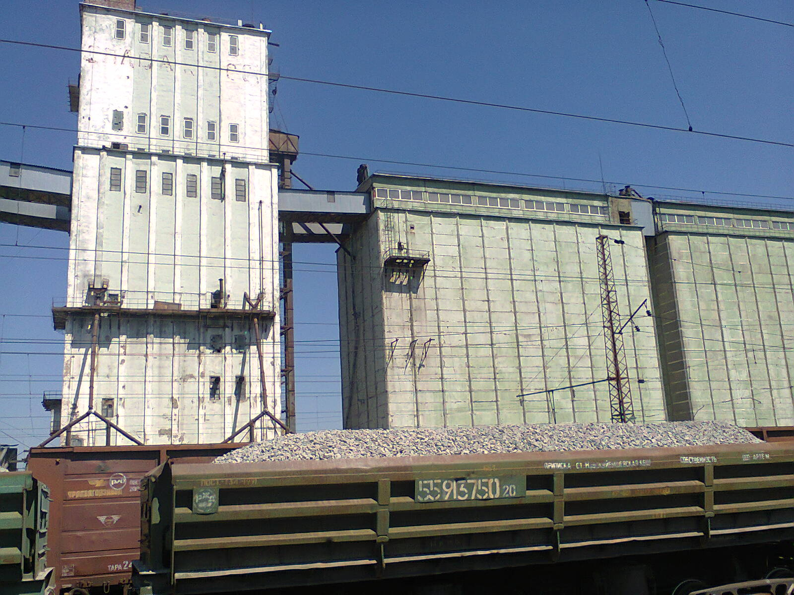 Здание элеватора на железнодорожной станции Таловая